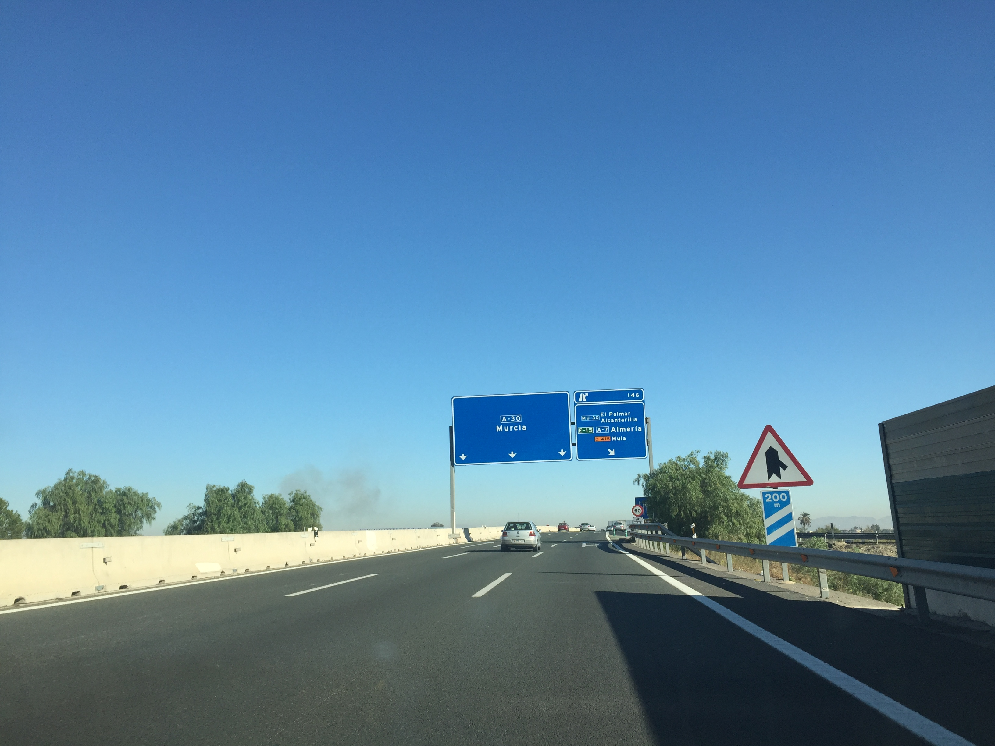 Motorvägen A30 i Murcia